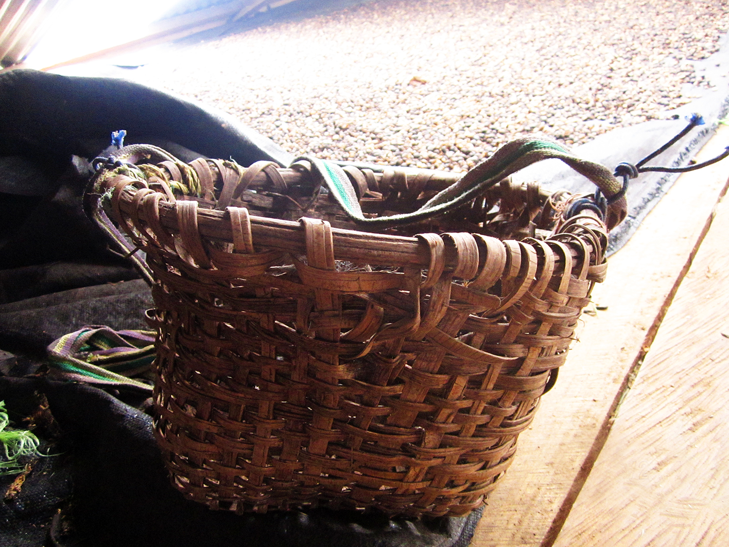 Cascada Escalera 3